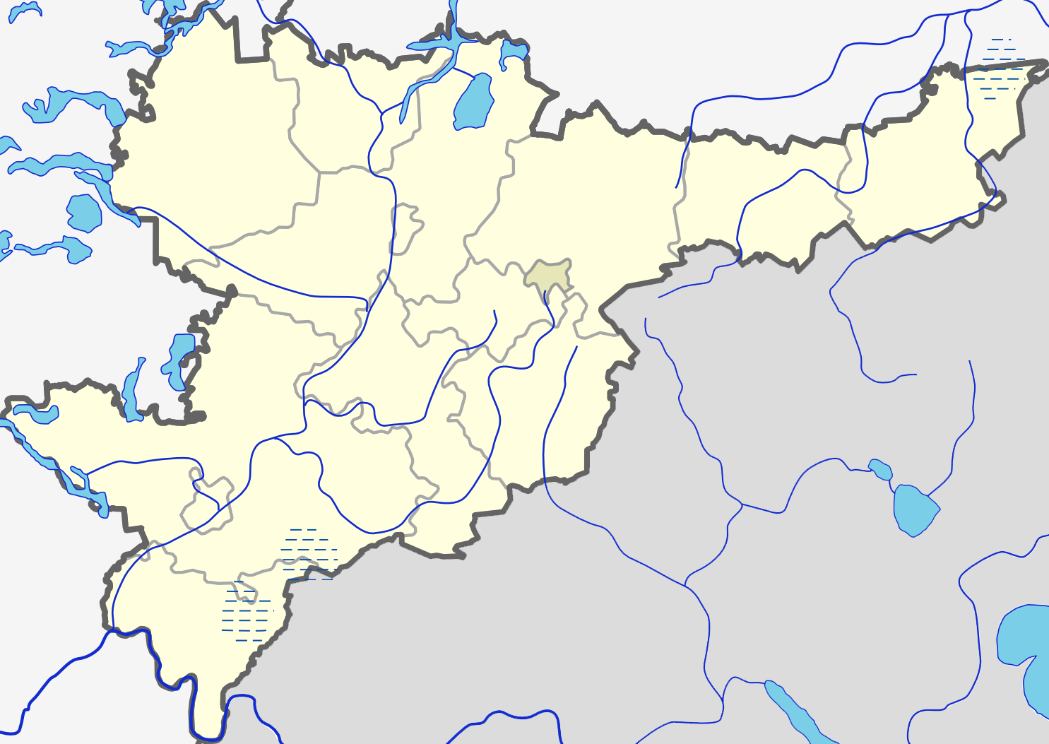 Švenčionių rajono žemėlapis.